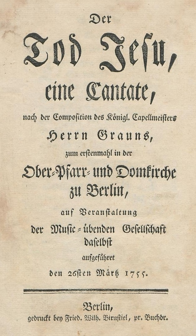 Titelseite des Textdrucks zur Uraufführung des Passionsoratoriums Der Tod Jesu von Carl Heinrich Graun nach dem Text von Karl Wilhelm Ramler am 26. März 1755 im Berliner Dom